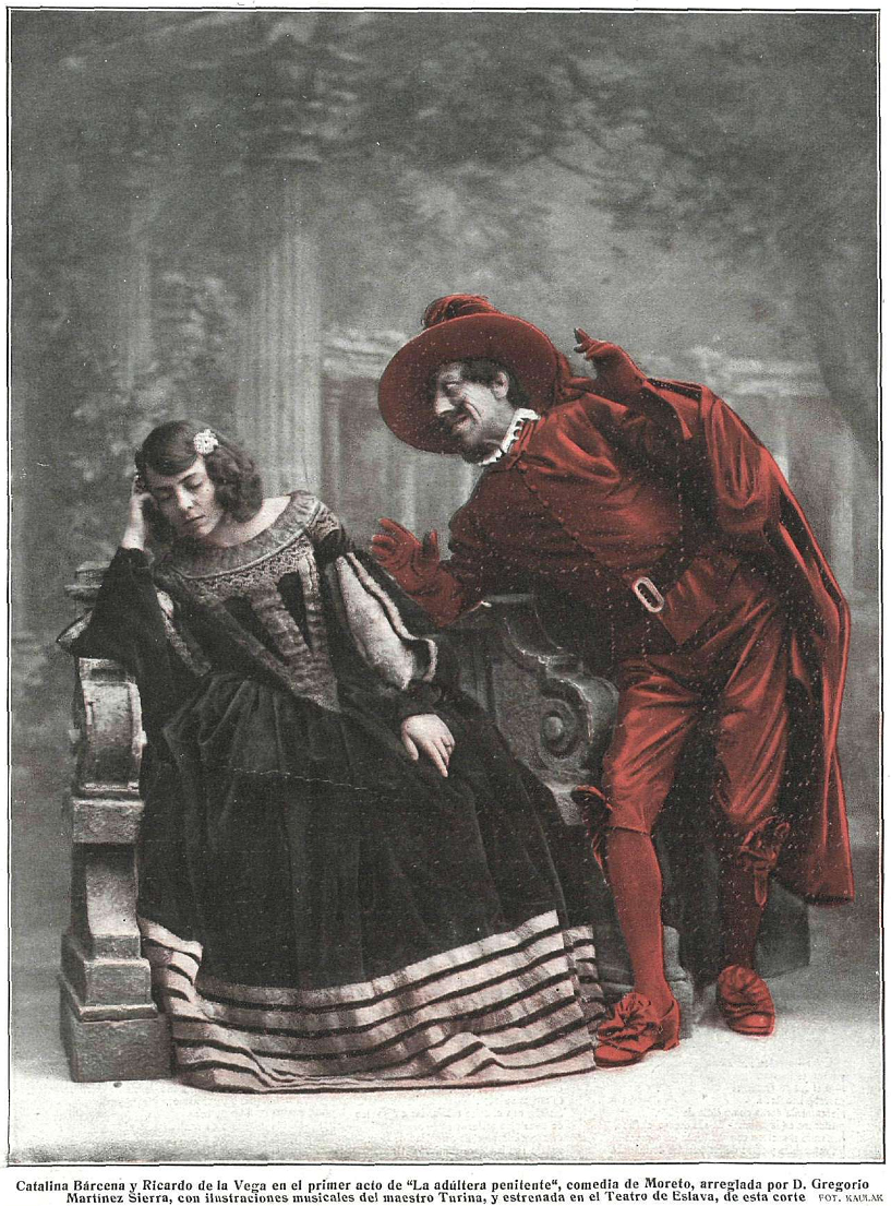 Catalina Bárcena y Ricardo de la Vega en el primer acto de «La adúltera penitente», comedia de Moreto, arreglada por D. Gregorio Martínez Sierra, con ilustraciones musicales del maestro Turina, y estrenada en el Teatro de Eslava, de esta corte. Fotografía publicada en la revista La Esfera.